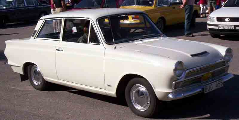 Ford Cortina De Luxe 1965